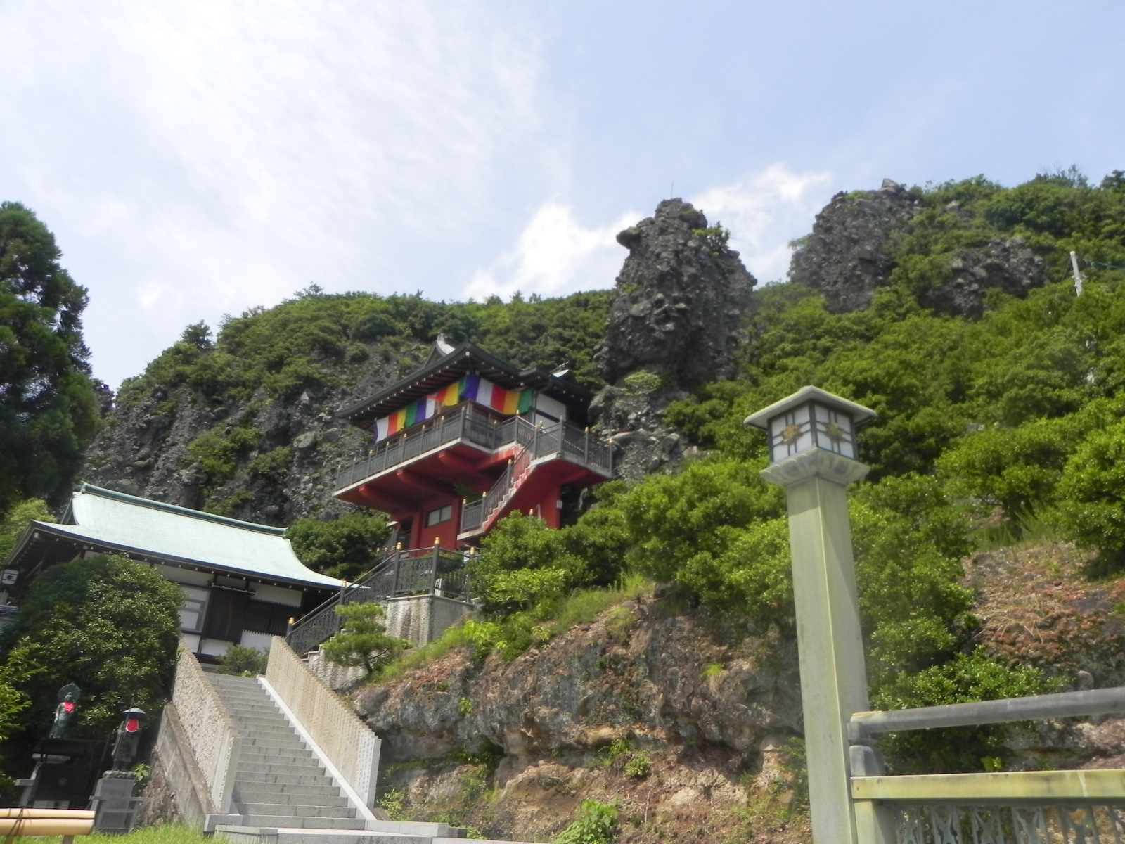 小豆島八十八箇所の西の瀧。